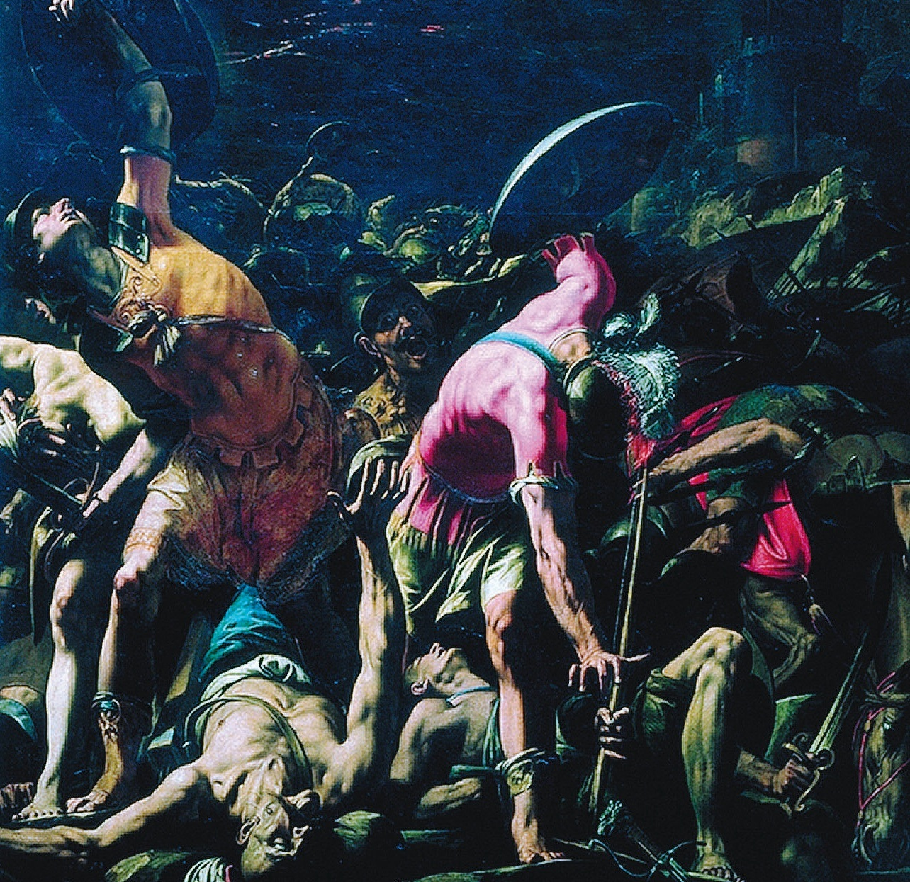 Battaglia di Sennacherib (dettaglio)